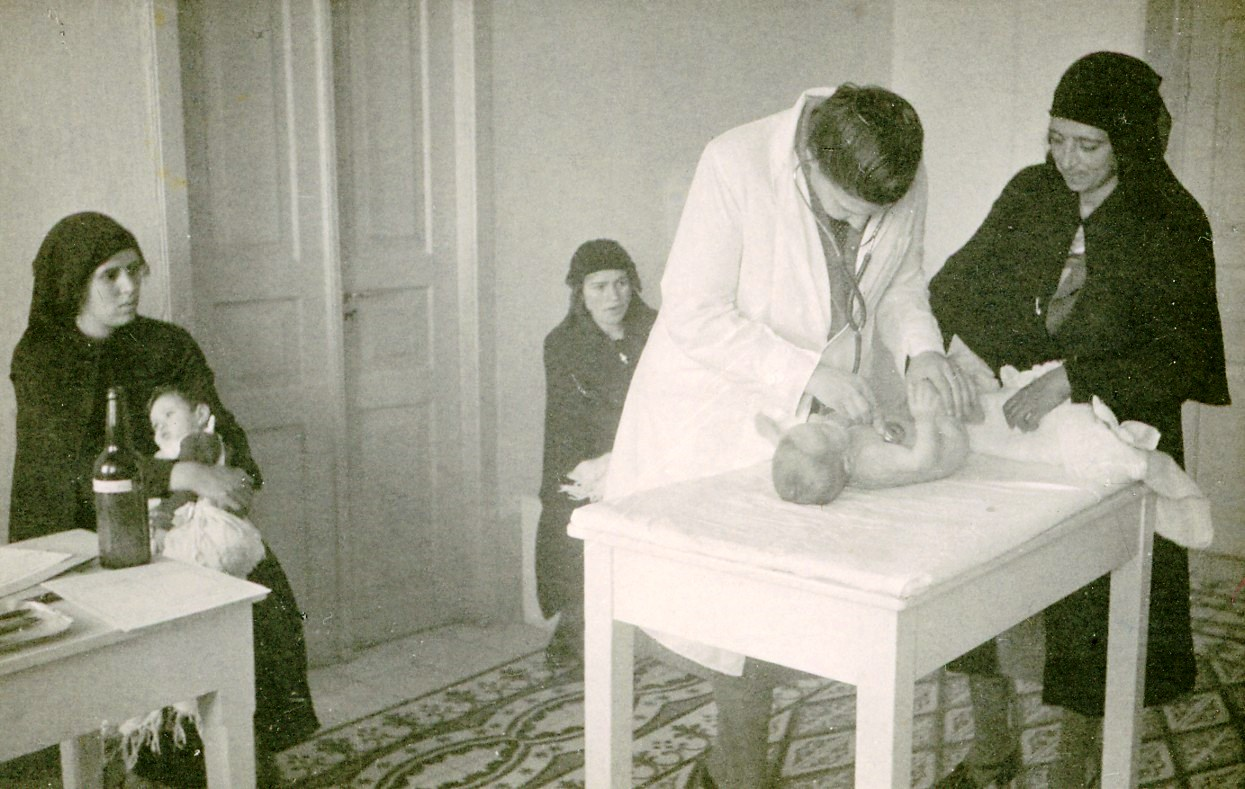 ד"ר הלנה כגן בודקת תינוק במרפאה